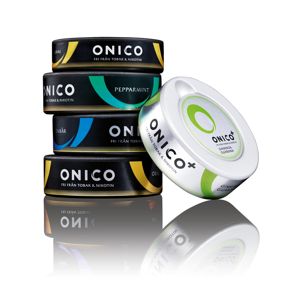 Onico gruppbild